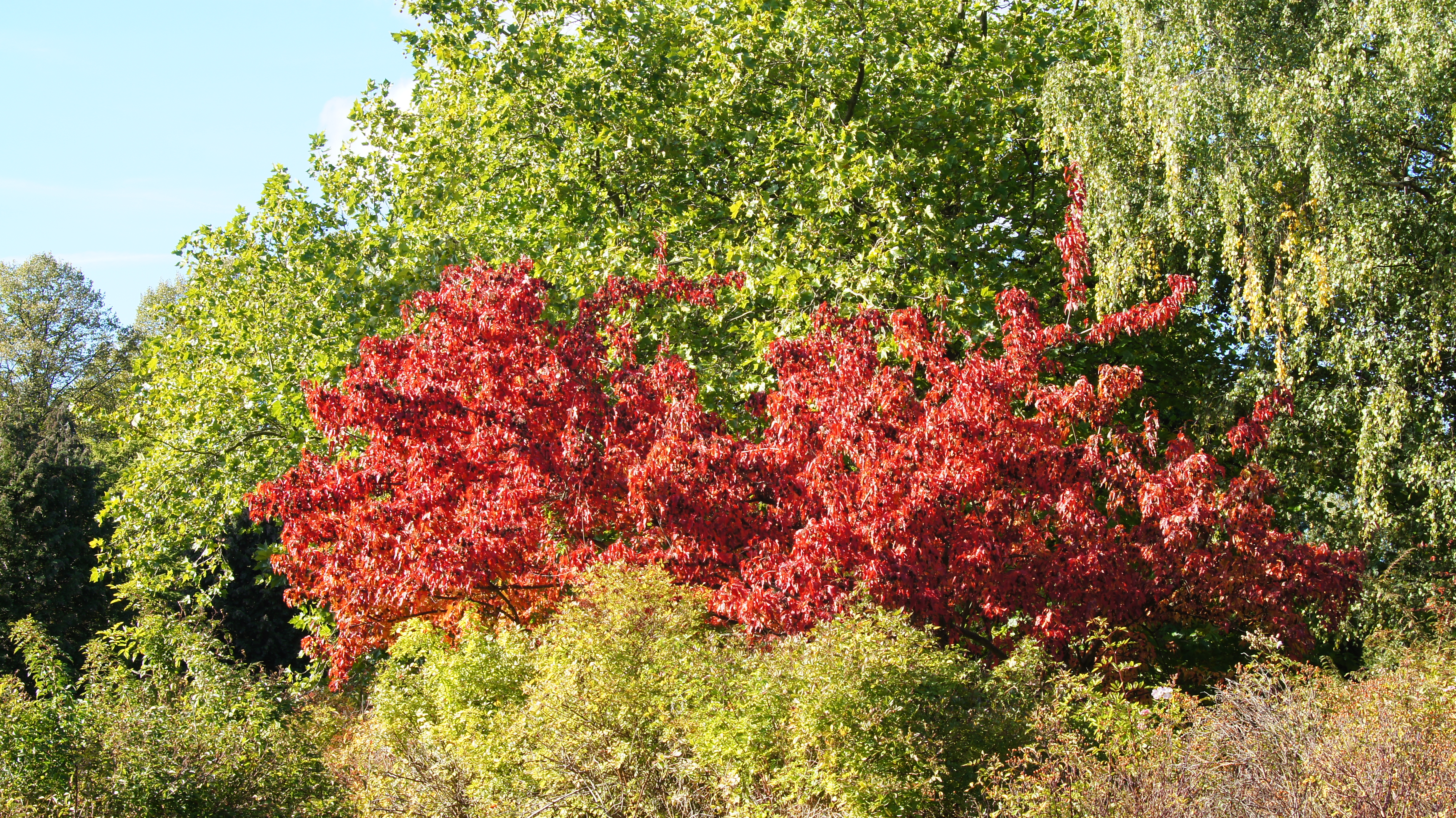 Sundby Kirkegård